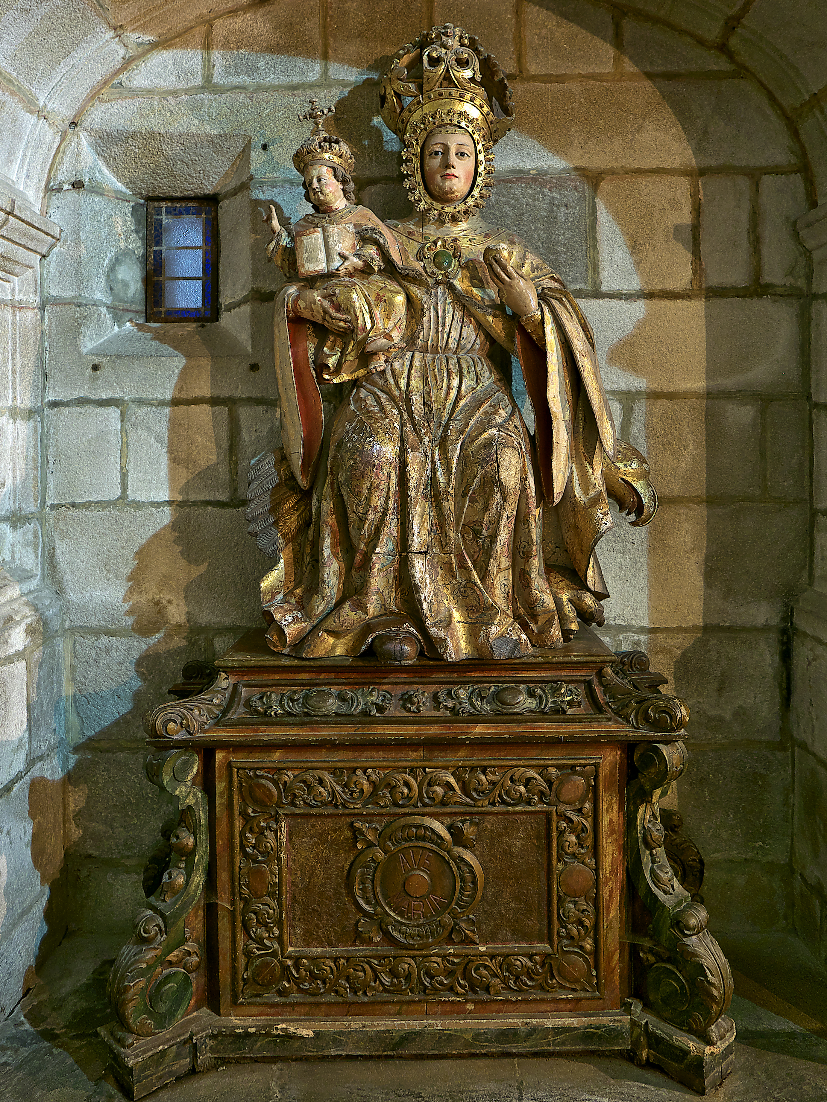 Capilla del Cristo, Monasterio de San Juan de Poyo. Imagen de madera policromada (s. XVIII)